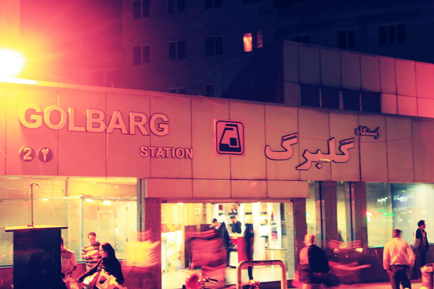 مترو گلبرگ